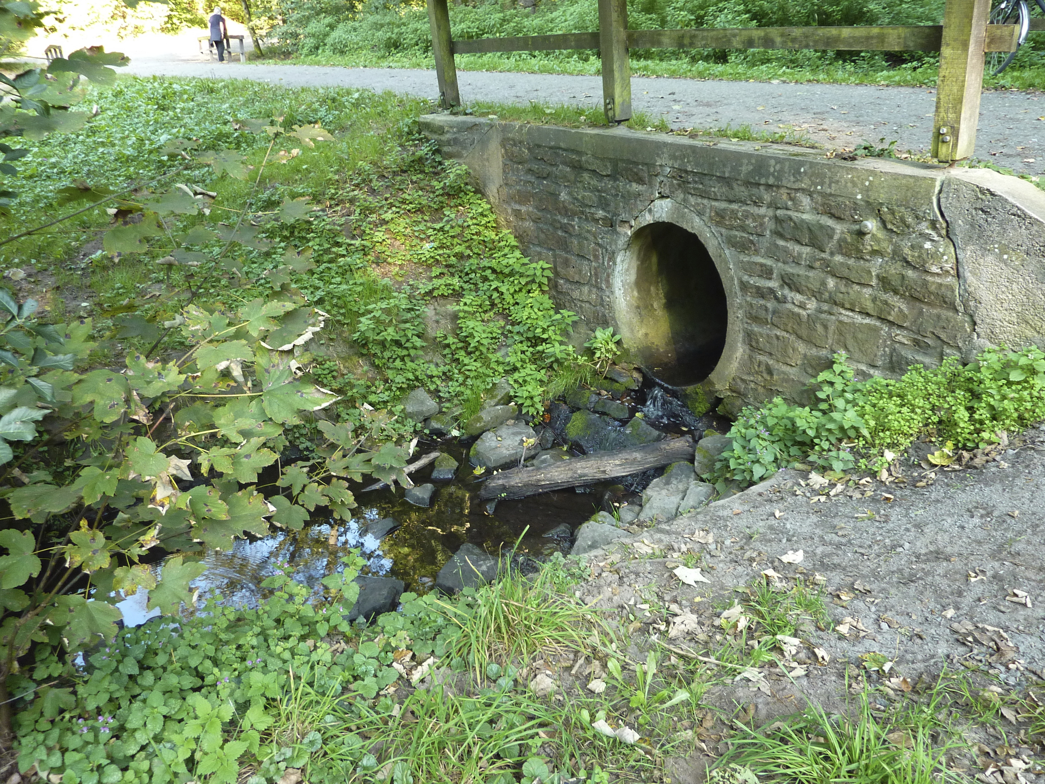 Der Königsbach, im Volksmund auch Luderbach genannt, ist ein 13,7 km langer linker (südlicher) Zufluss des Flusses Main im deutschen Bundesland Hessen. Der Bach entspringt östlich der Stadt Dreieich im Landkreis Offenbach, durchfließt das Stadtgebiet von Neu-Isenburg sowie den Frankfurter Stadtwald und den dort befindlichen Jacobiweiher. Der Königsbach mündet verrohrt im Stadtteil Niederrad der Stadt Frankfurt am Main. An der abgebildeten Königswiese ist der Bachlauf für eine kurze Strecke in zwei Arme geteilt. Das Foto zeigt den Austritt des westlichen Arms unter einer Brücke der Stoltzeschneise, Blickrichtung nach Osten